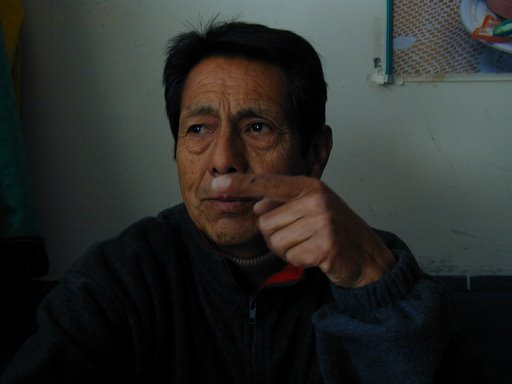 Josué Sánchez